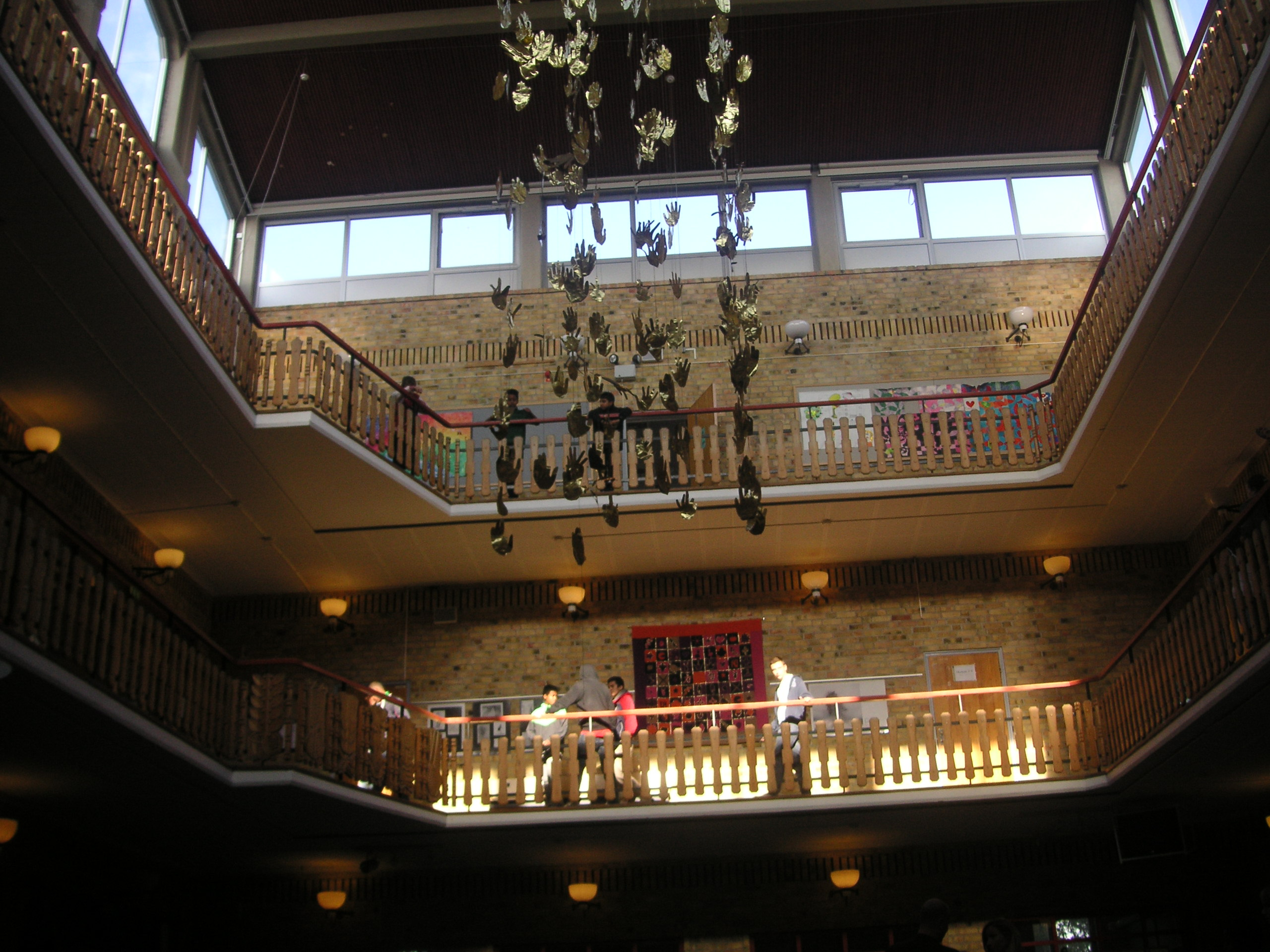 Aspudden School in Stockholm